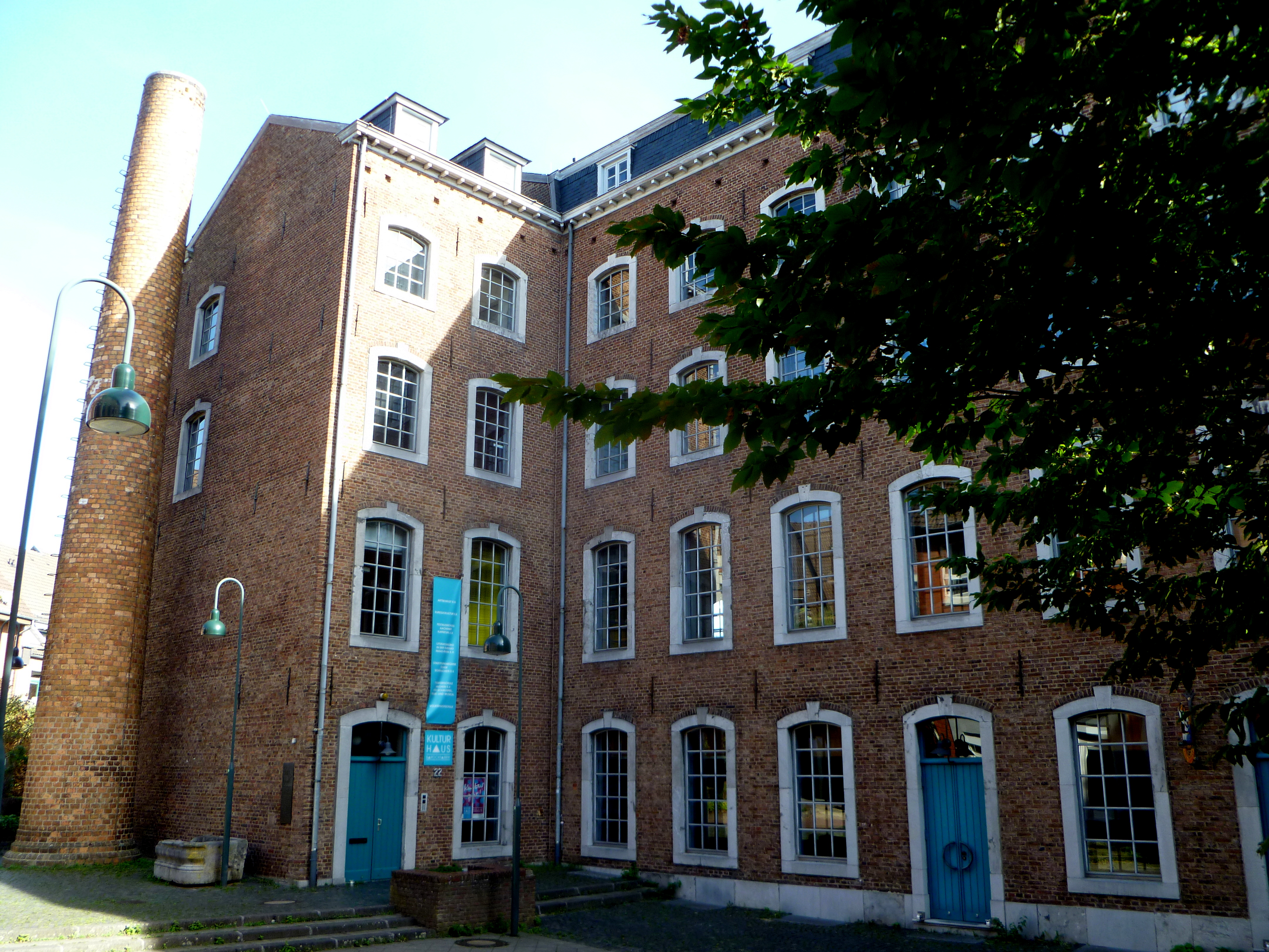 ehem. Spinnerei Startz am Löhergraben in Aachen, heute Barockfabrik; Baudenkmal